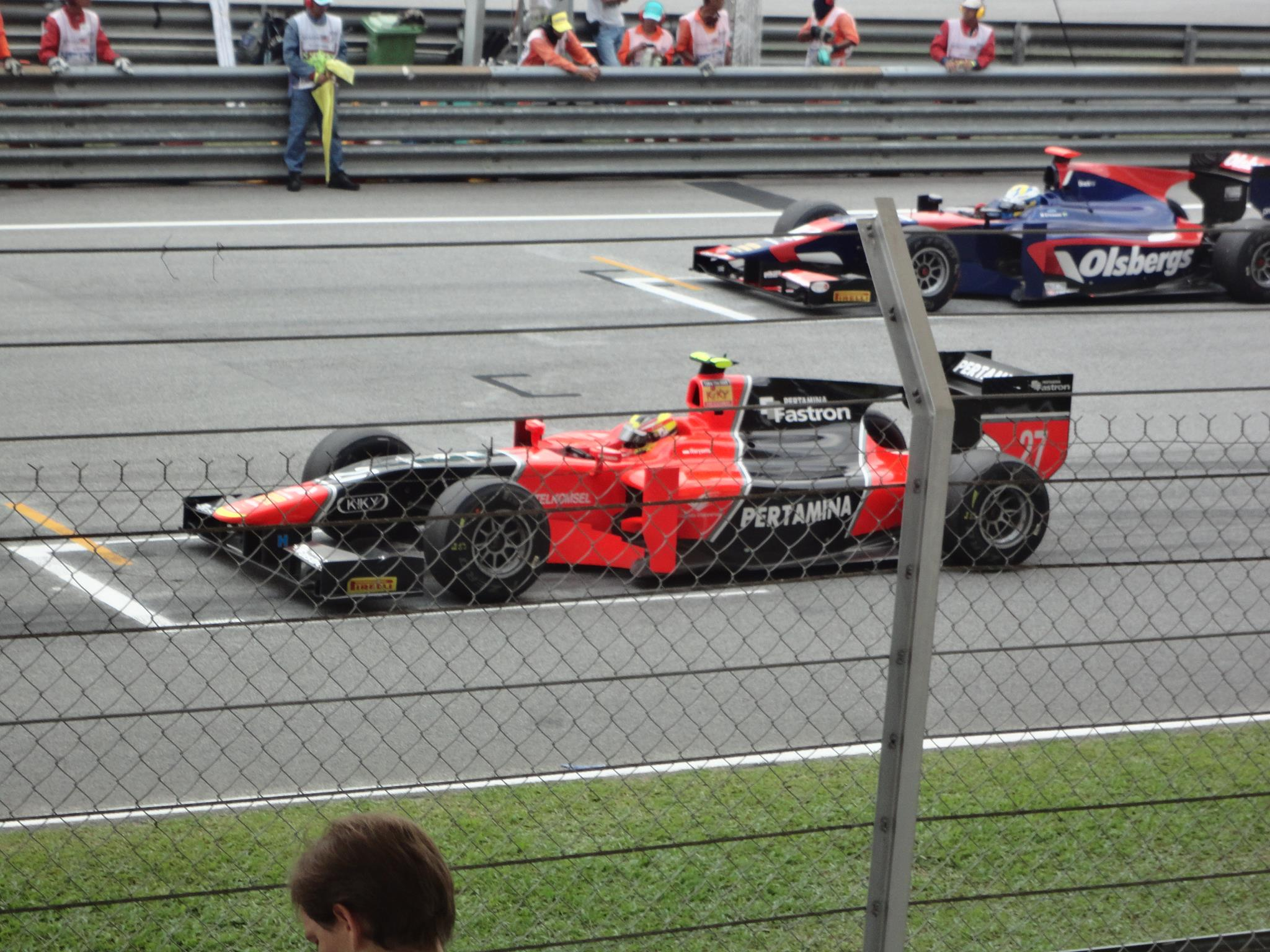 Rio Haryanto bersiap start lomba GP2 di Sepang, Kuala Lumpur, Malaysia